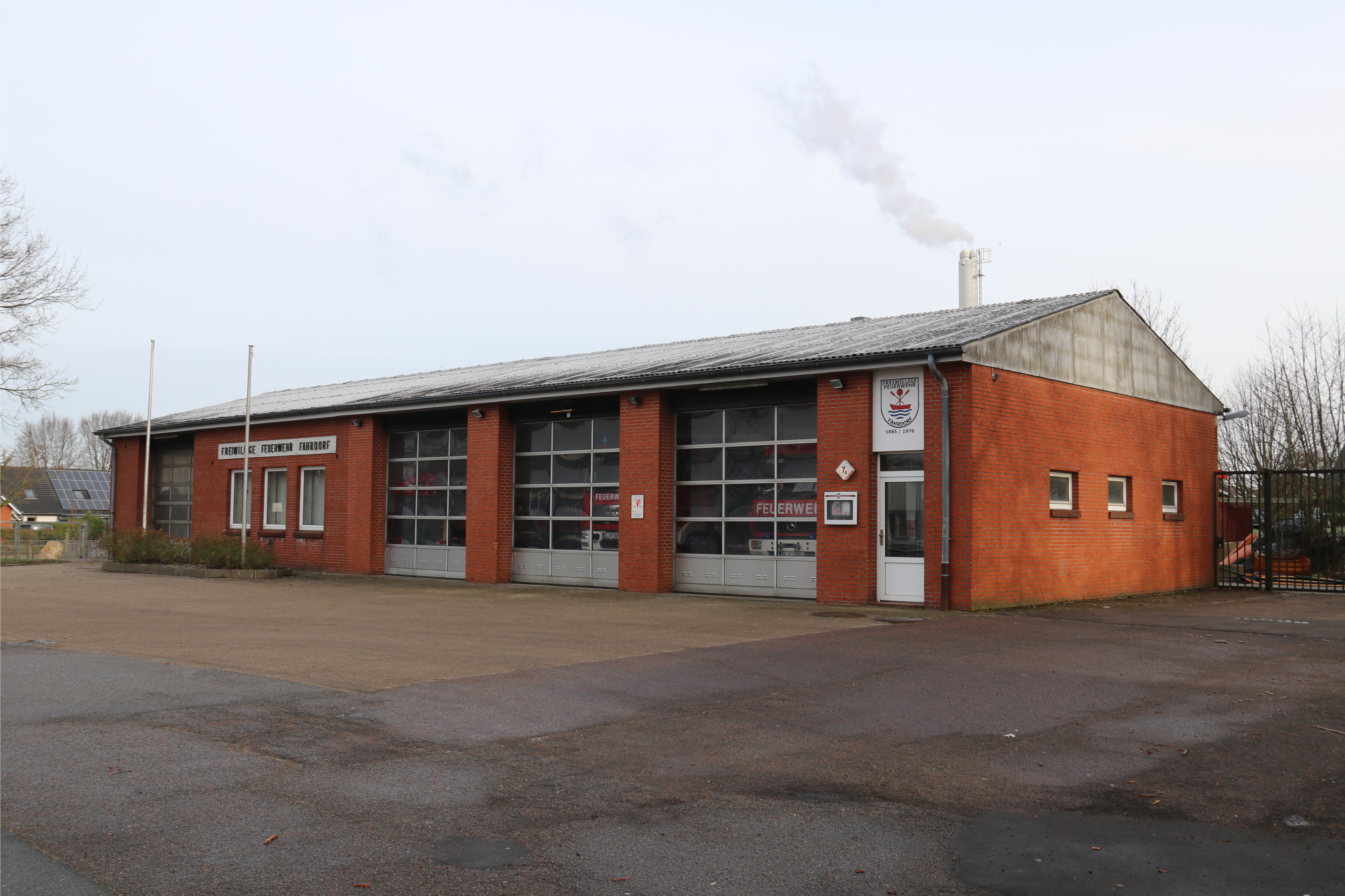 Feuerwehrgerätehaus Fahrdorf